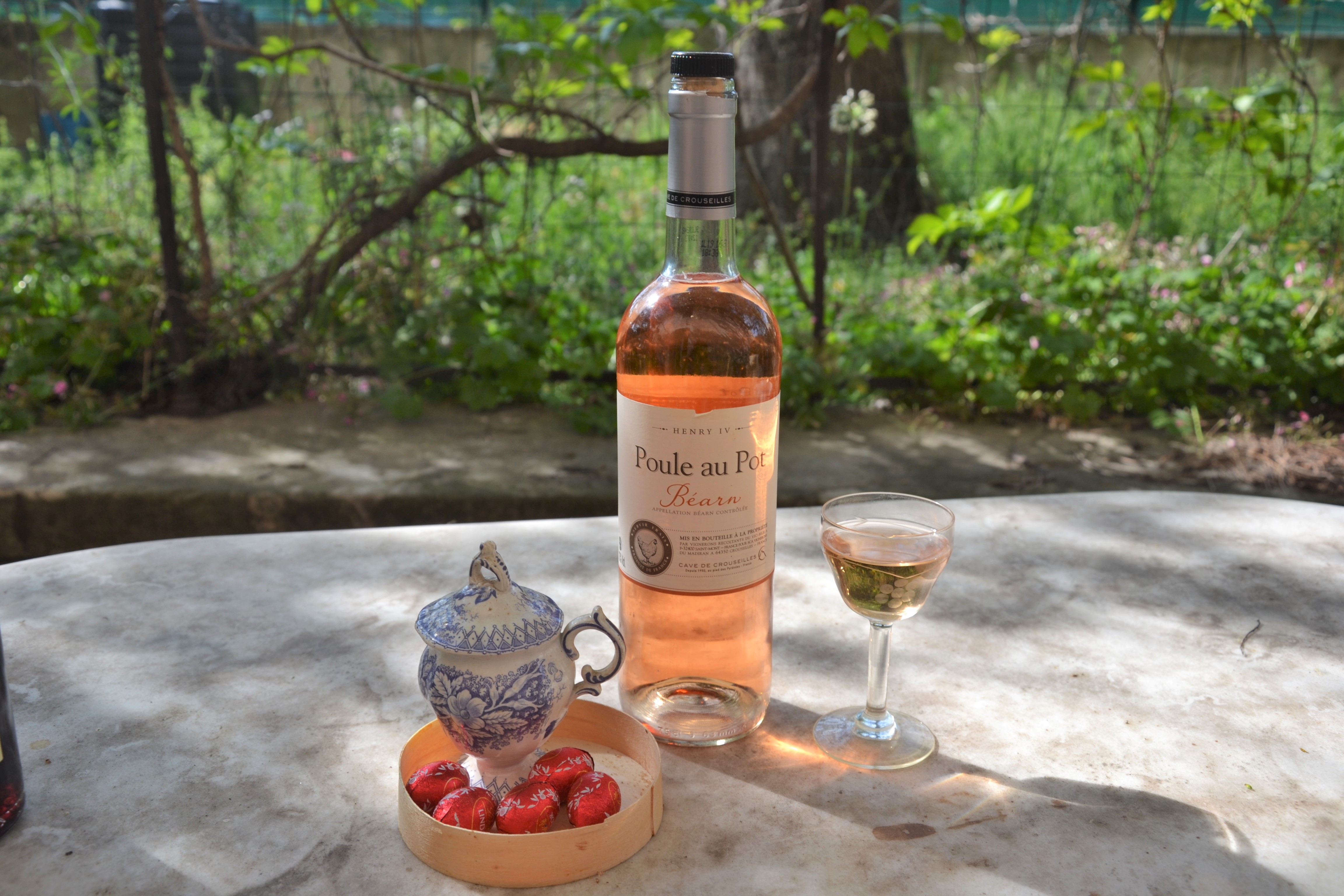 rosé du Béarn en l'honneur d'Henri IV